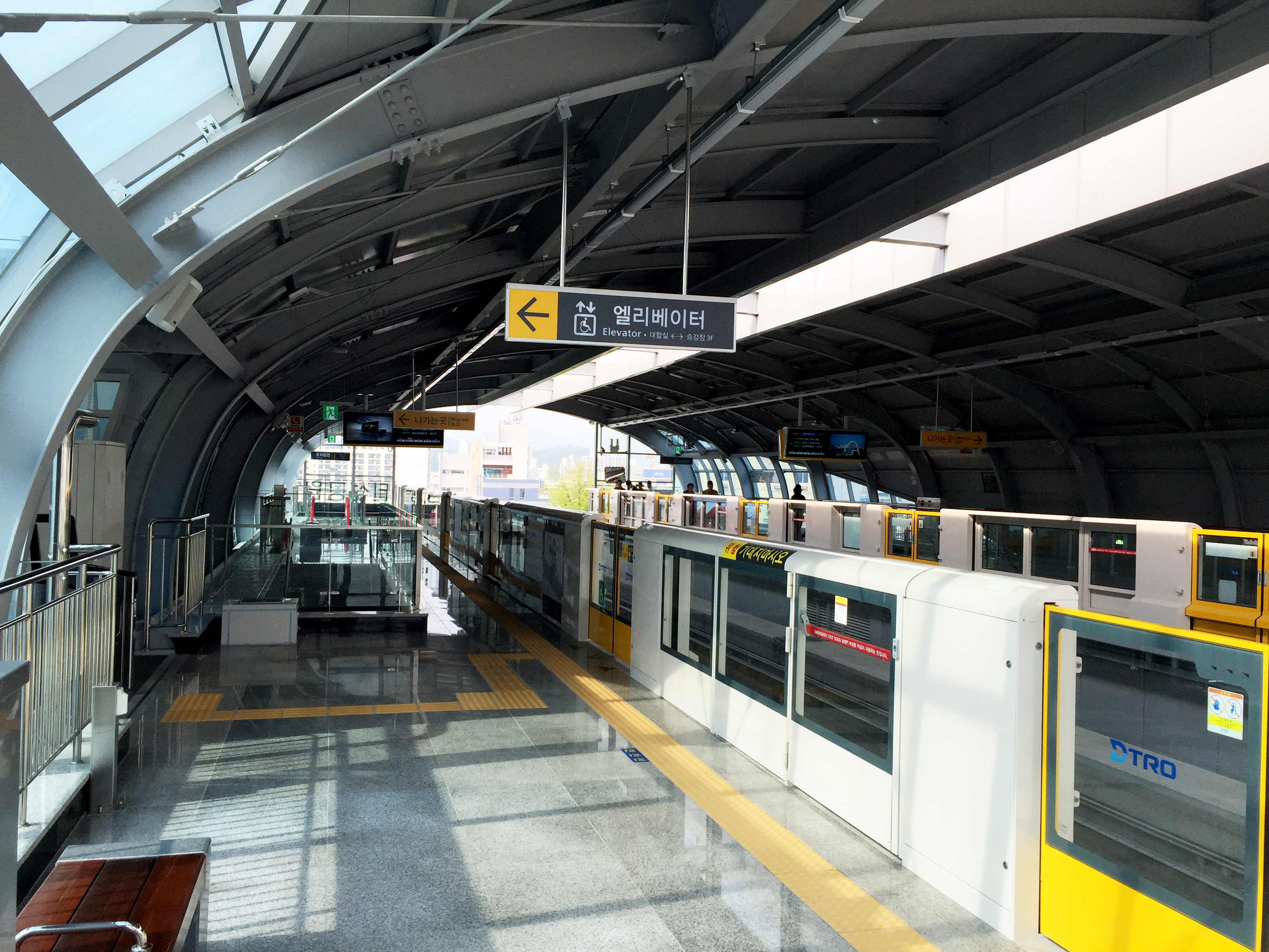 달성공원역 승강장